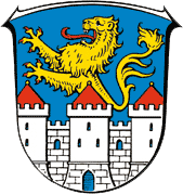 Wappen von Driedorf